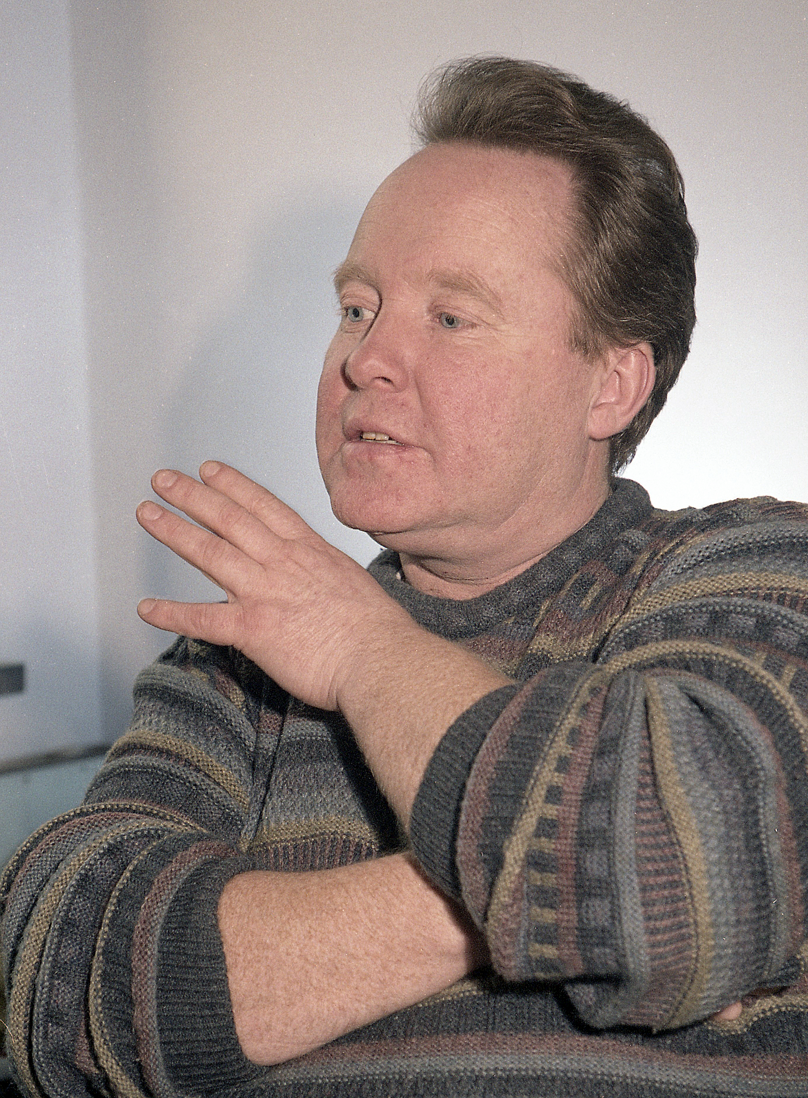 Mihkel Smeljanski